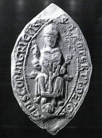 Hontpázmány nb. Lampert egri püspök pecsétje, 1271